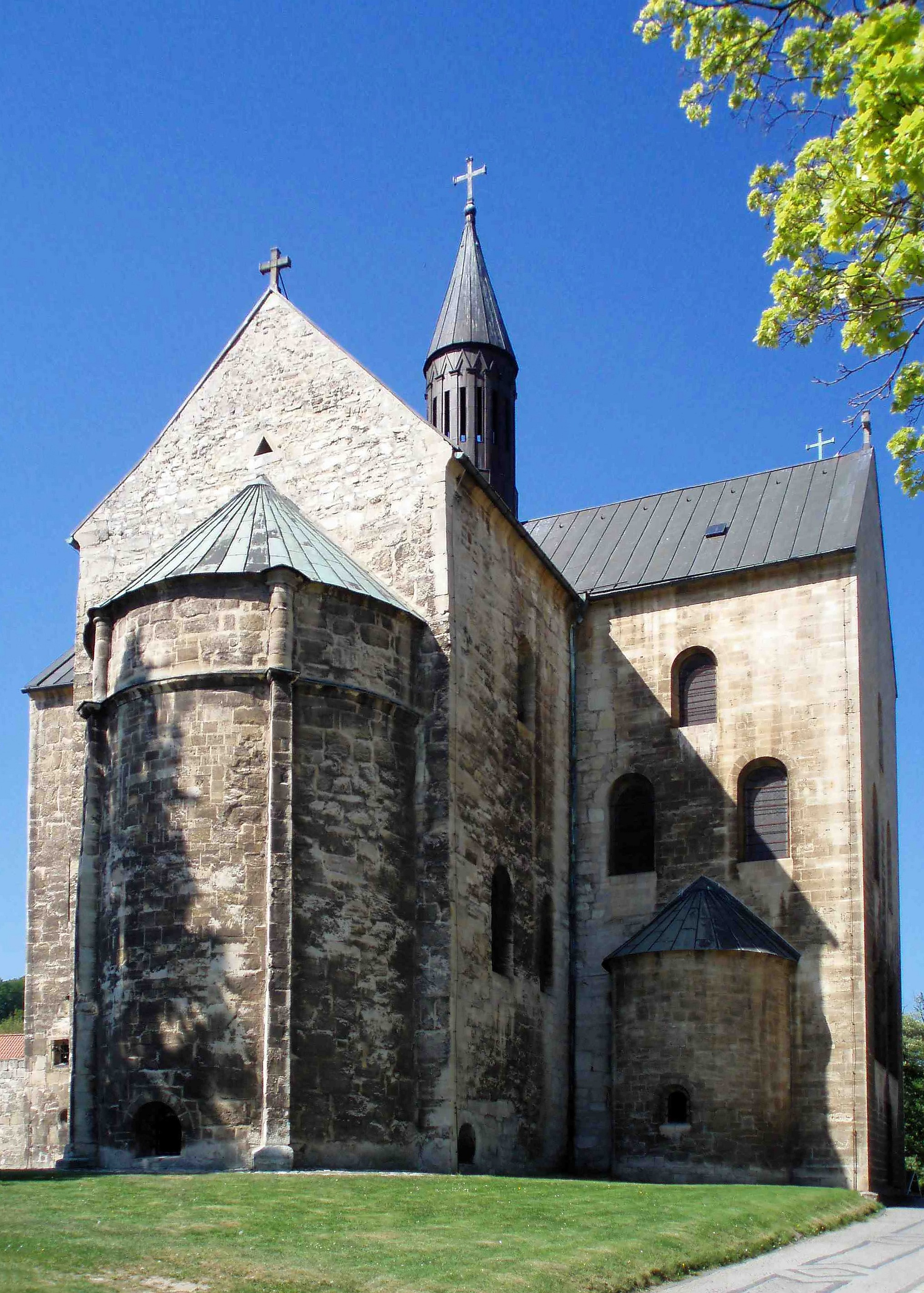 Nordseite der Stiftskirche Gernrode